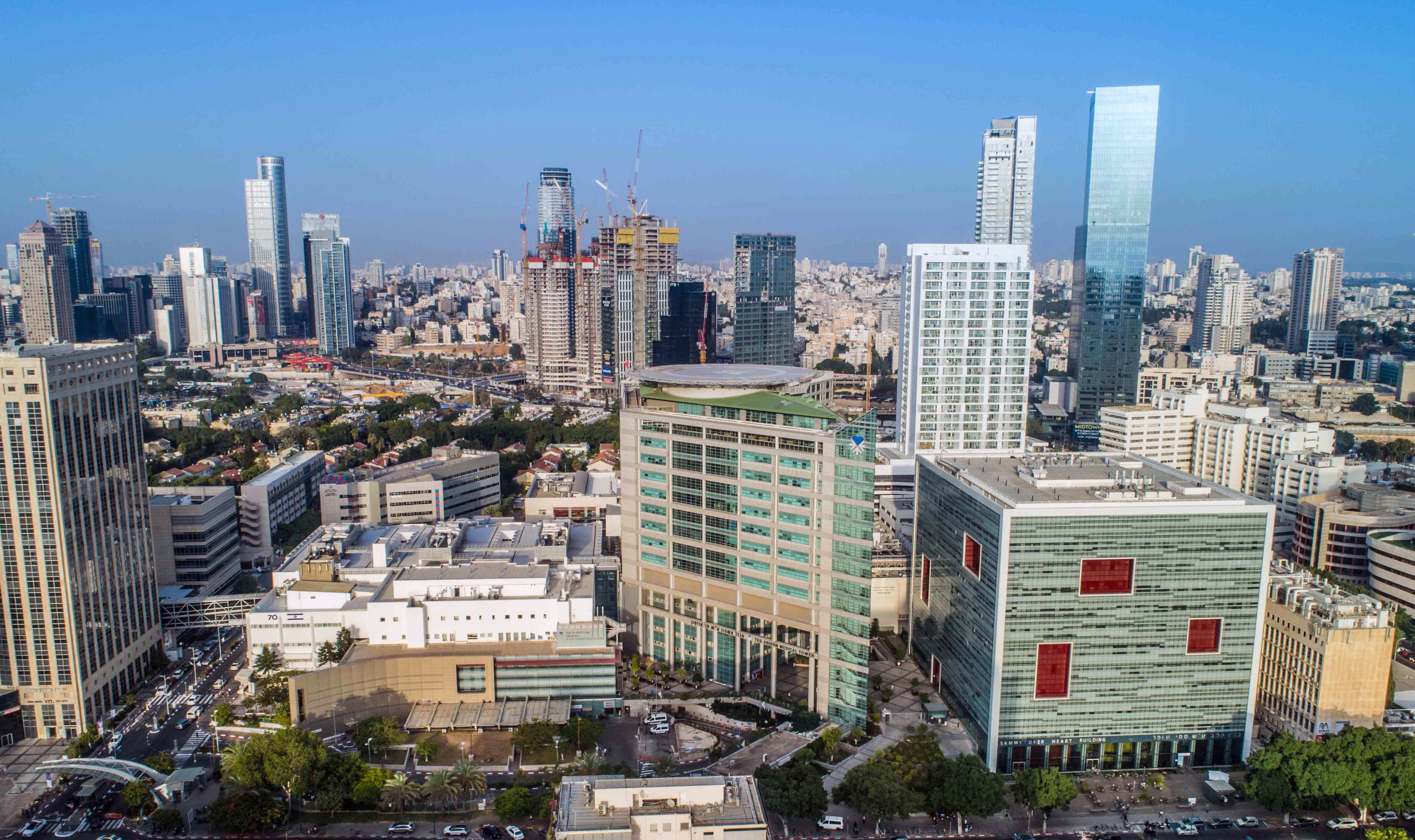 מבט מרחוב ויצמן